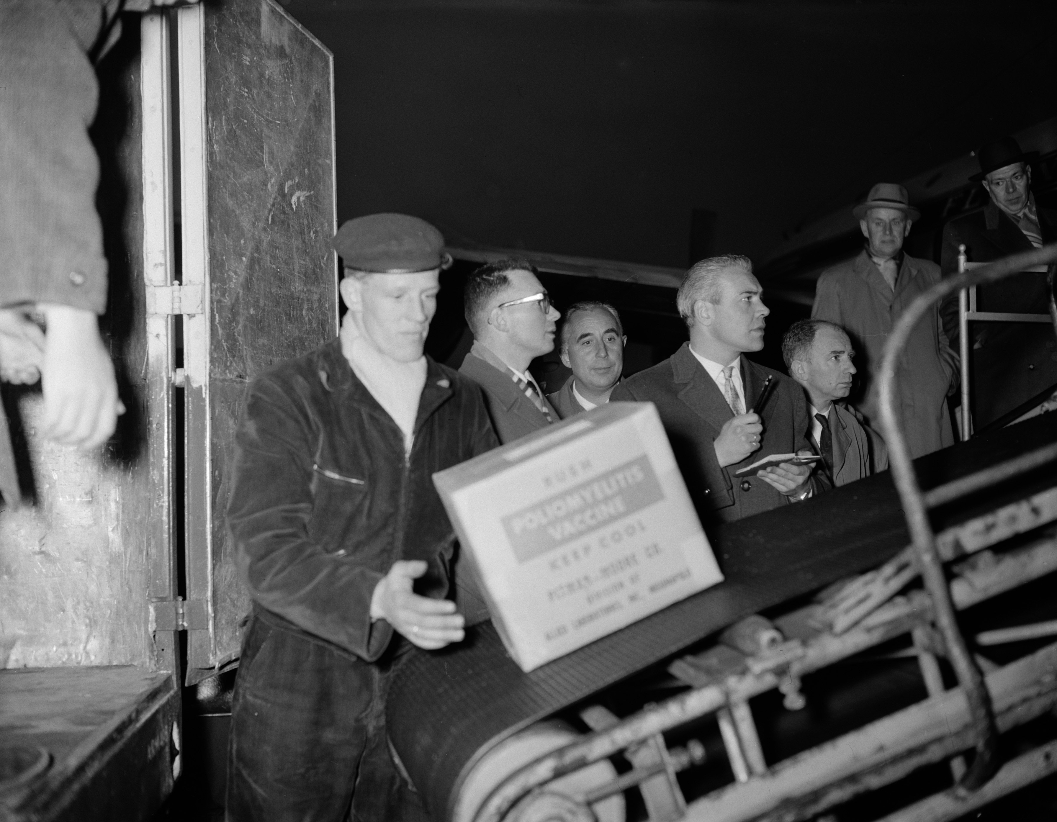 Collectie / Archief : Fotocollectie Anefo Reportage / Serie : [ onbekend ] Beschrijving : Dr. H. Cohen (rechts) van het Rijksinstituut voor de gezondheid, R. W. Welling (links) van de Dagra Datum : 15 januari 1958 Trefwoorden : RIJKSINSTITUTEN Persoonsnaam : Dr. H. Cohen, Welling, R.W. Fotograaf : Bilsen, Joop van / Anefo Auteursrechthebbende : Nationaal Archief Materiaalsoort : Negatief (zwart/wit) Nummer archiefinventaris : bekijk toegang 2.24.01.04 Bestanddeelnummer : 909-2529